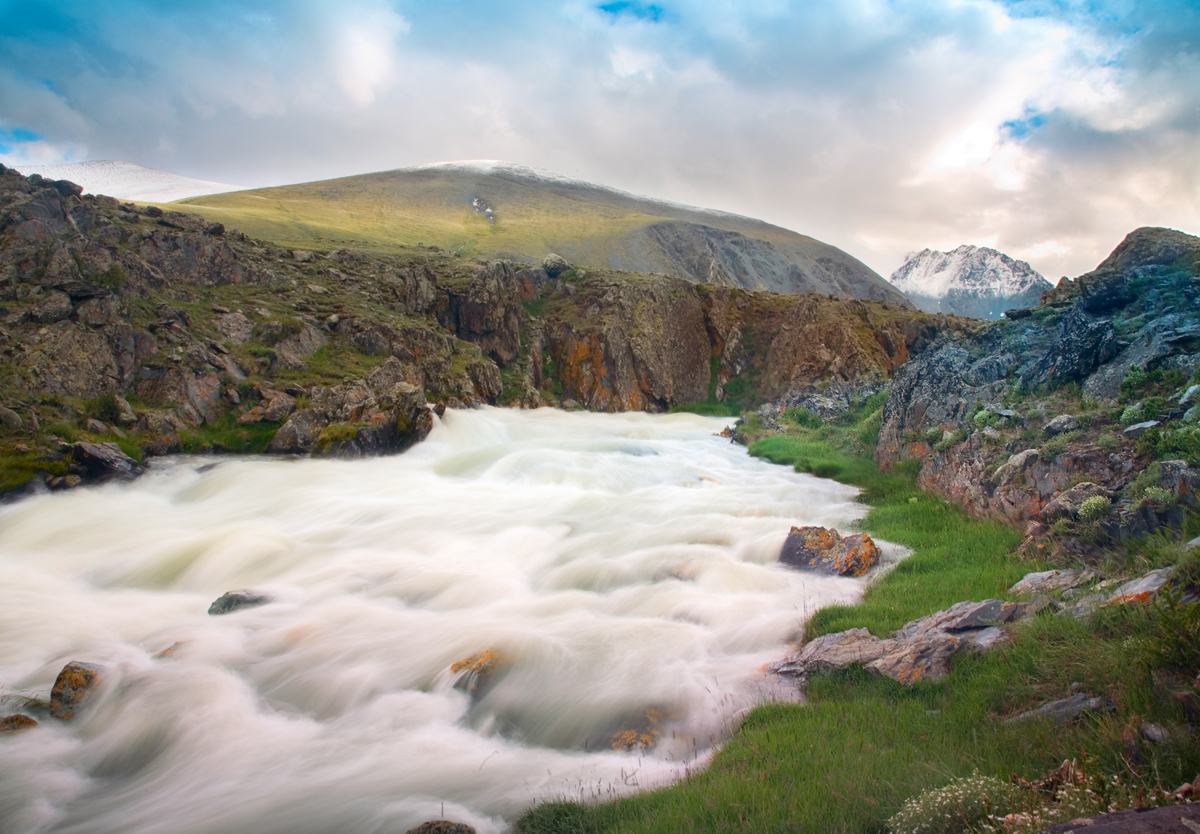 Река Елангаш